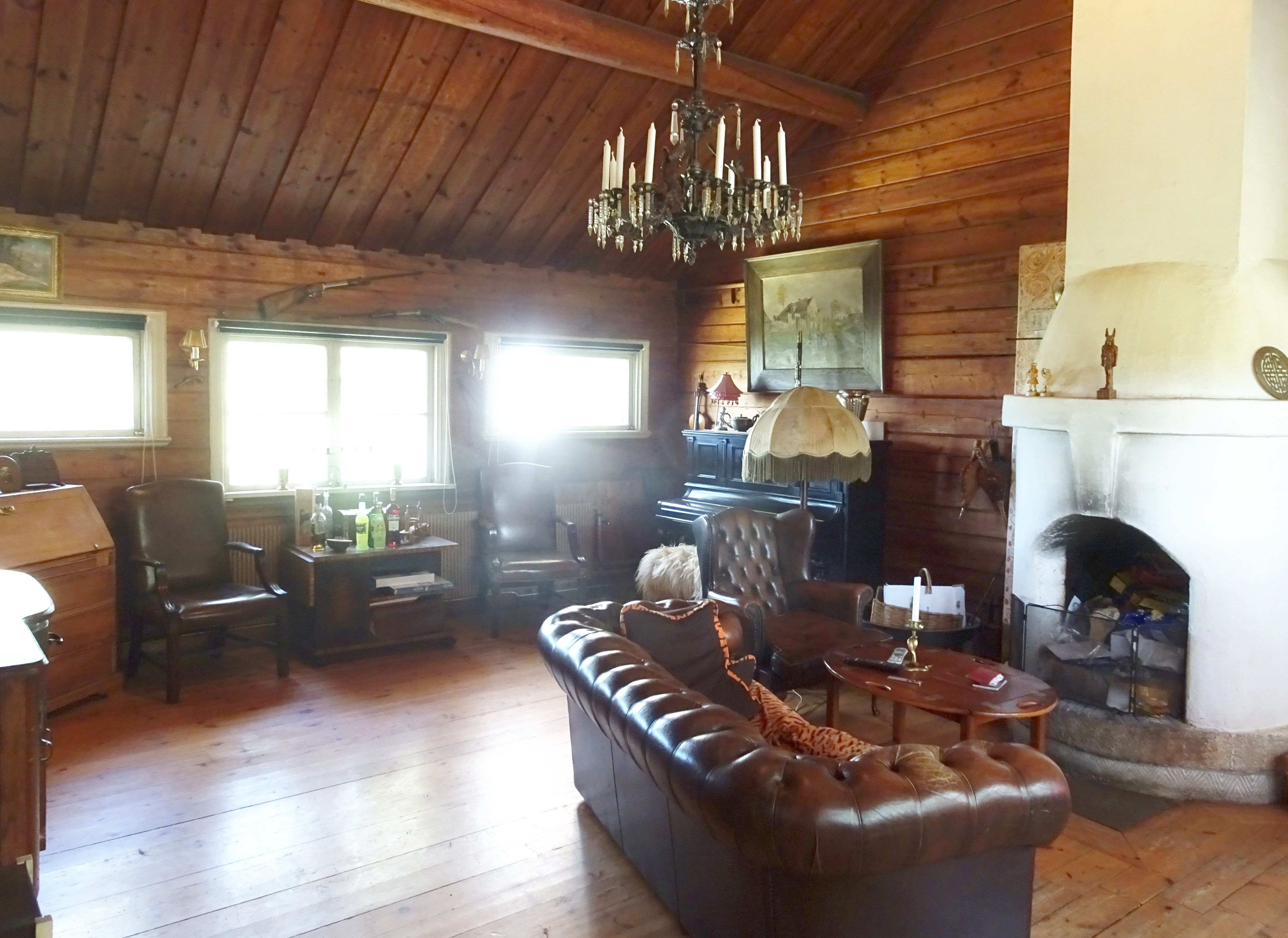 Villa Kikut, Alice Tegnérs hem mellan 1912 och 1926 (salen)